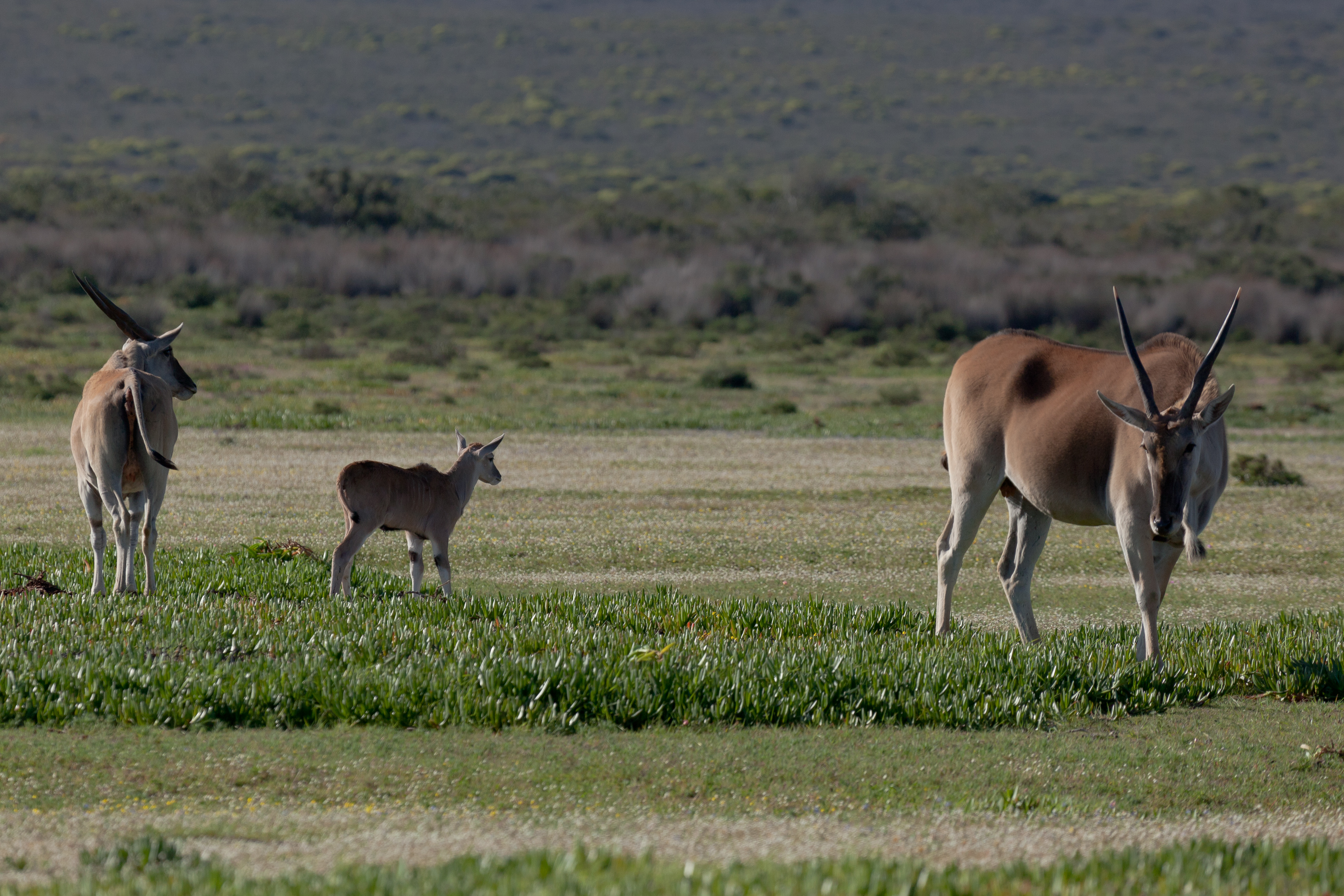 Eland, (Taurotragus oryx), ook Kaapse Eland of Kleinere Eland, de Hoop natuurreservaat, Wees-Kaap,Suid-Afrika